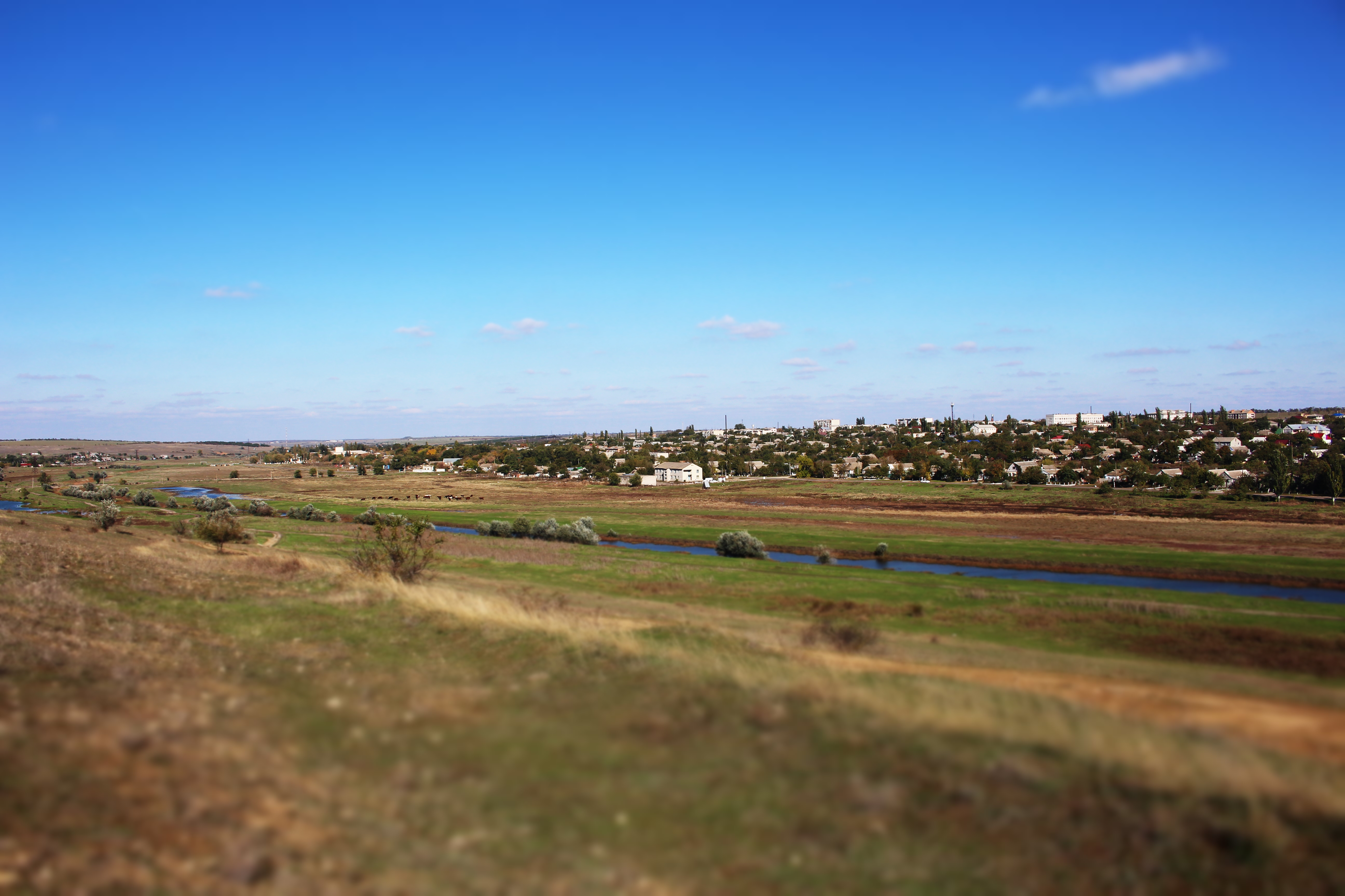 Пейзаж рідного селища